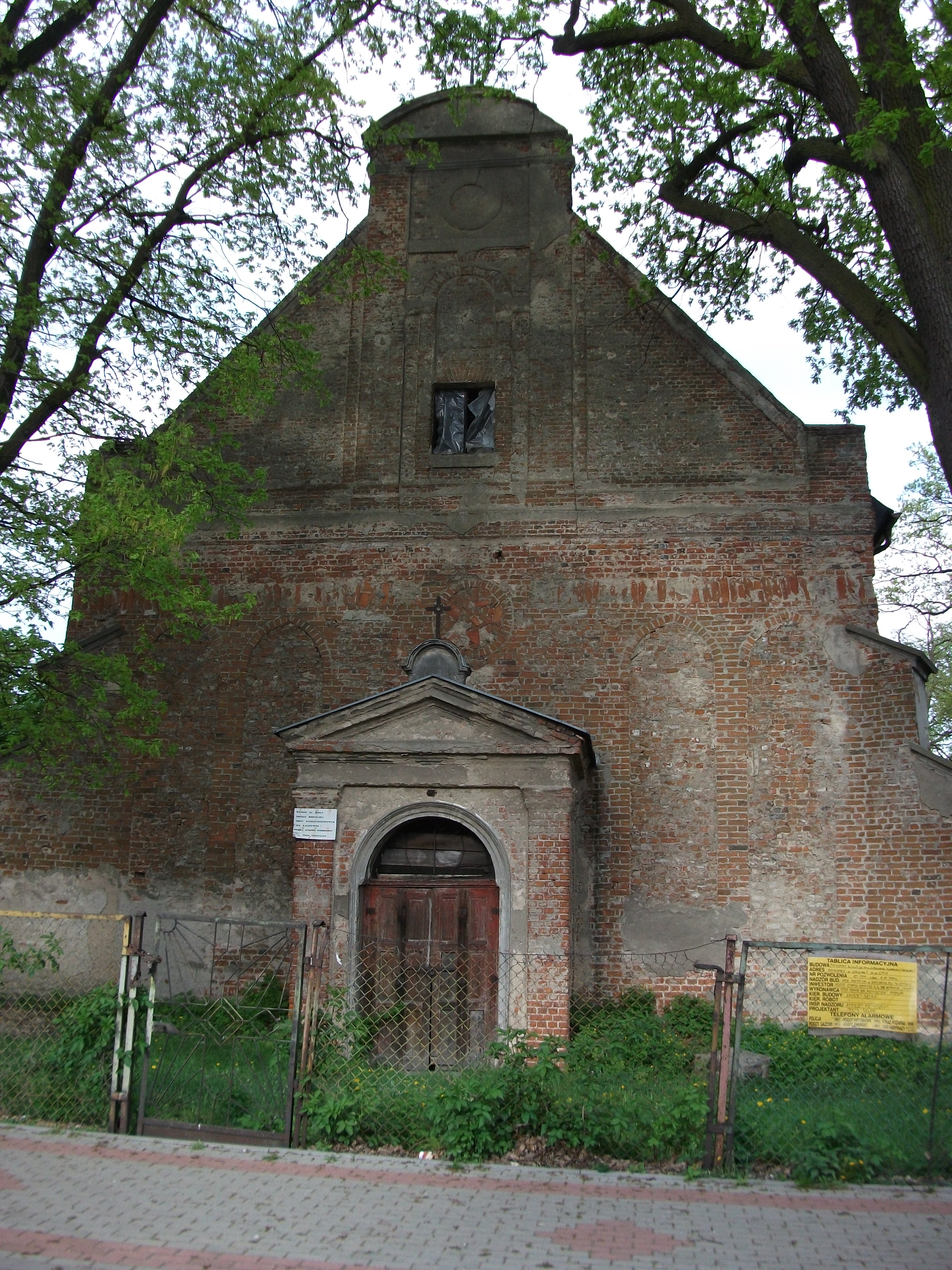 Biskupiec, ul. Szkolna 7 - ruiny kościoła ewangelickiego (pierwotnie katolickiego), XVI, 1726, 1878-1889